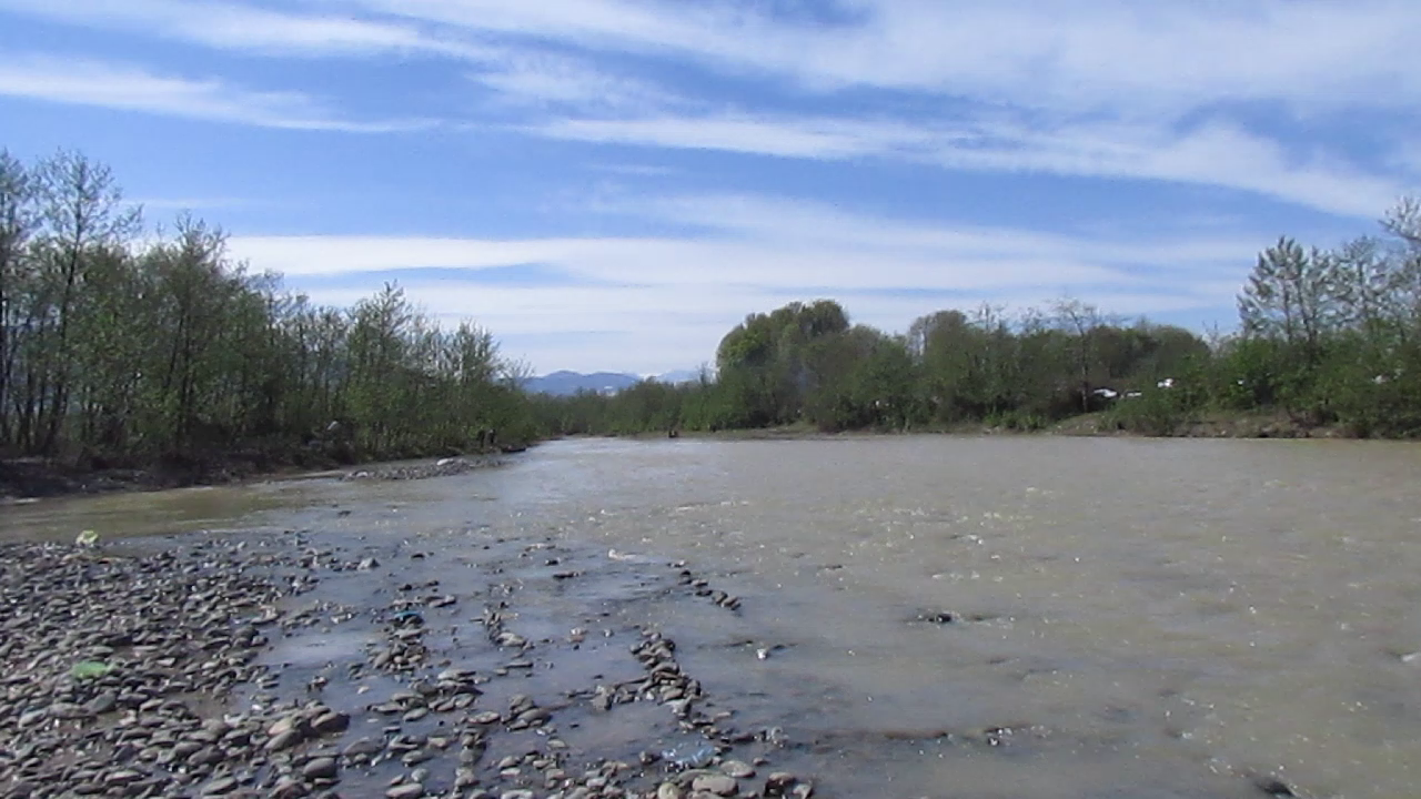 رودخانه شنرود(شیمرود)در فصل بهار